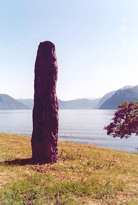 Bautasteinen ved Fylkesmannsgarden på Nybø i Leikanger kommune vart på 1900-talet flytta to gonger. No står han på ei flate nede ved sjøen, omlag 100 meter vest for bygningane. Foto Hermund Kleppa/Fylkesarkivet i Sogn og Fjordane